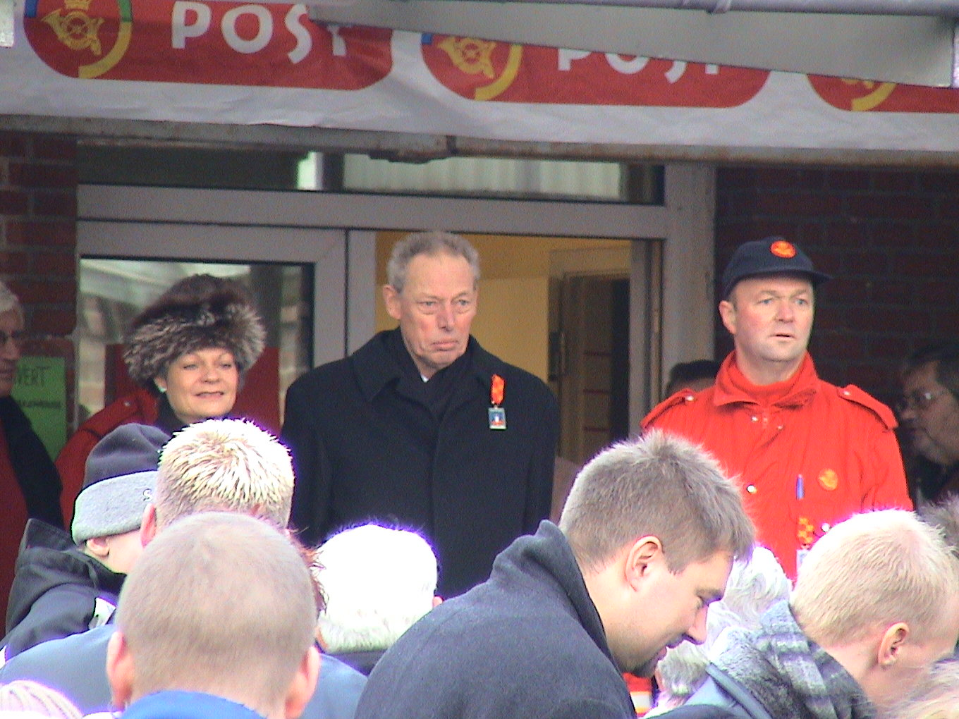 Julemærkemarchen 3.12.2006 kl. 9.00 - den 30. julemærkemarch fra Maribo på Lolland. Skydes i gang af Grev Ingolf med Grevinde Sussie ved sin side.